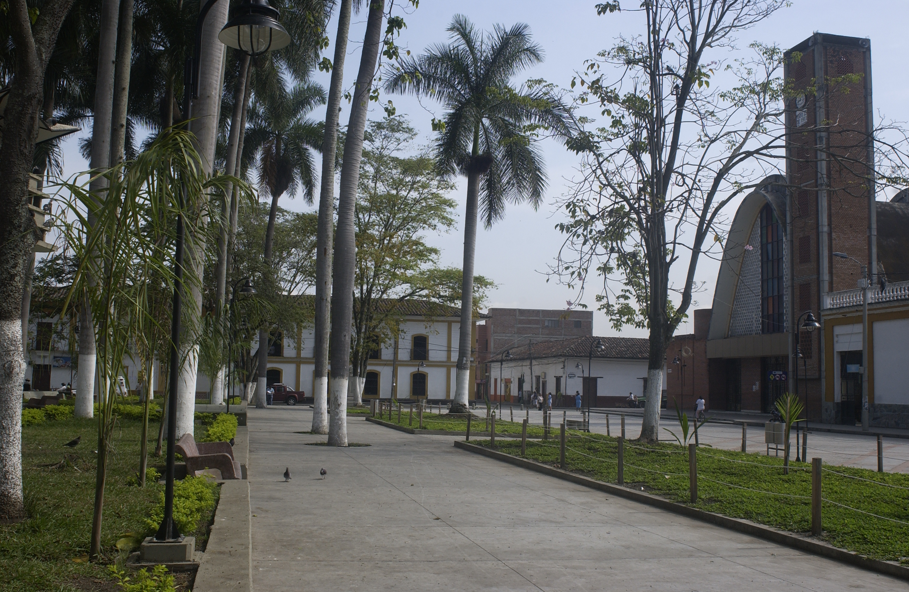 Parco Francisco Antonio Rada a El Cerrito, Valle del Cauca Pareque Francisco Antonio Rada a El Cerrito, Valle del Cauca